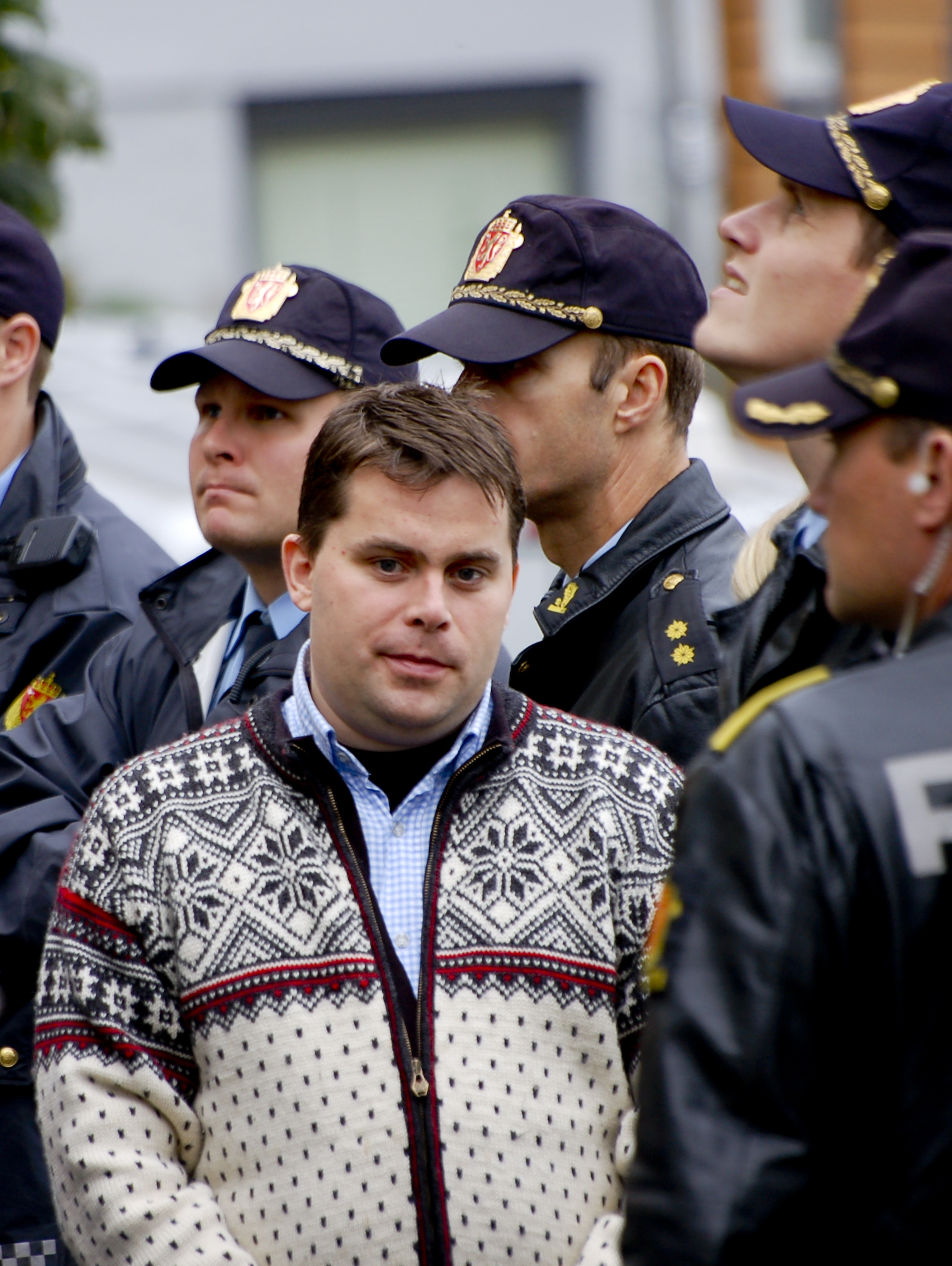 David Toska omringet av politi, på åstedsbefaring under NOKAS-rettsaken